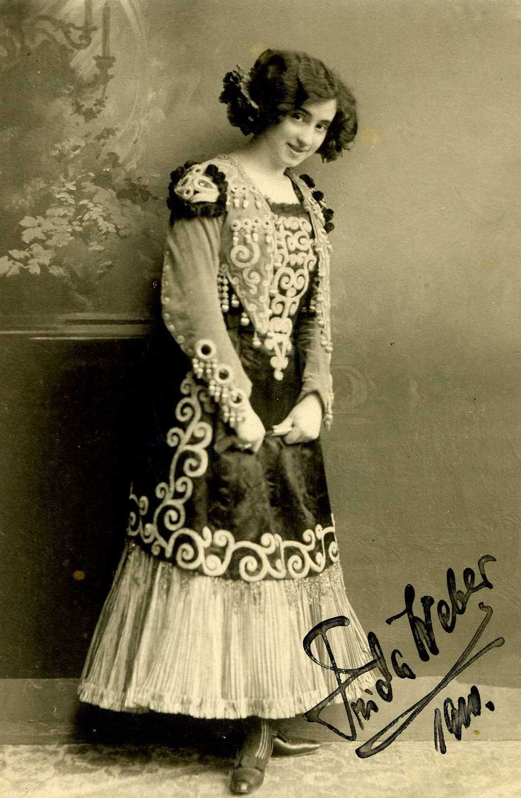 Bühnenpostkarte von Frida Weber-Flessburg, handsigniert im Jahre 1911.